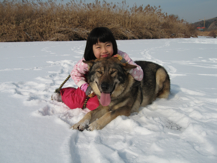 국내 개썰매대회에서 1등한 울프독